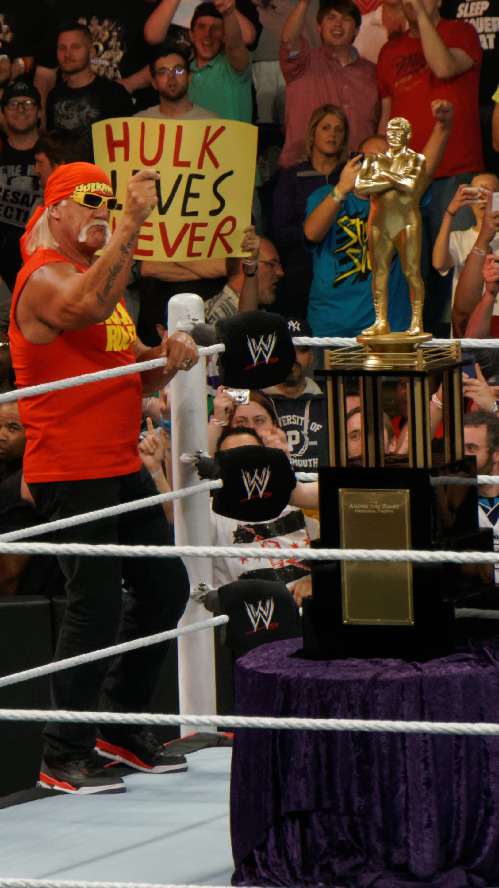 2014-04-07_21-27-15_NEX-6_1624_DxO